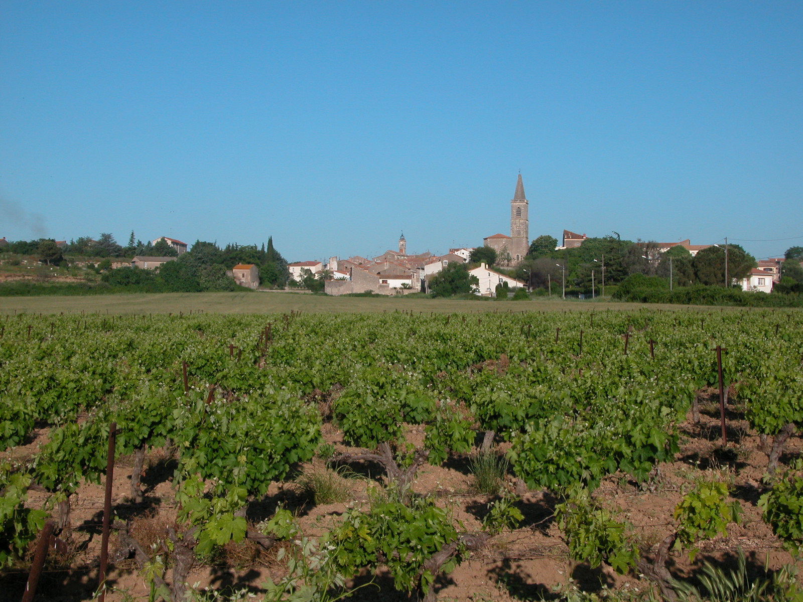 Vue du vieux Maraussan (Hérault), le clocher de l'église et l'ancienne mairie